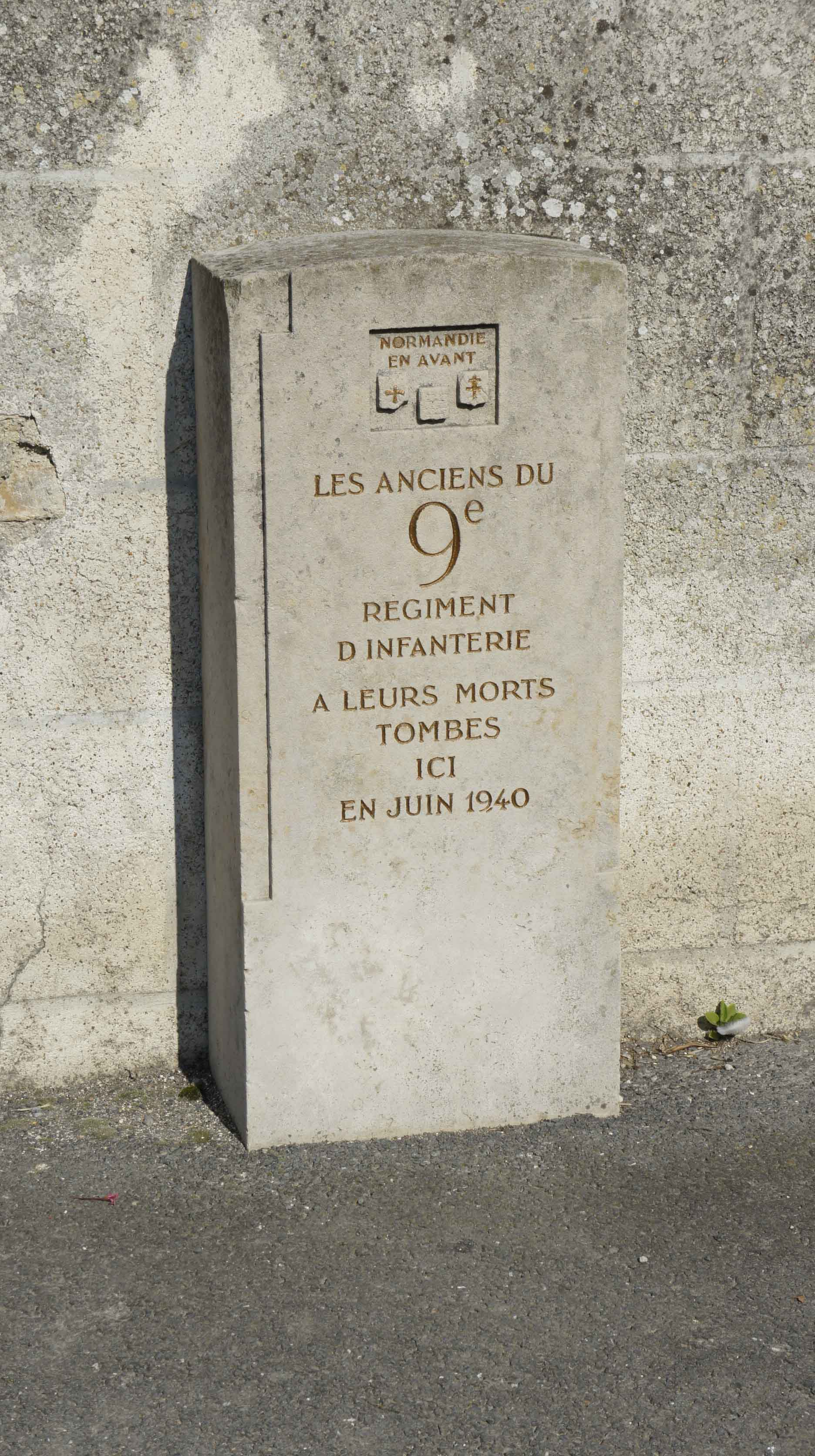 borne à st-Masmes en mémoire du 9e RI en 1940.